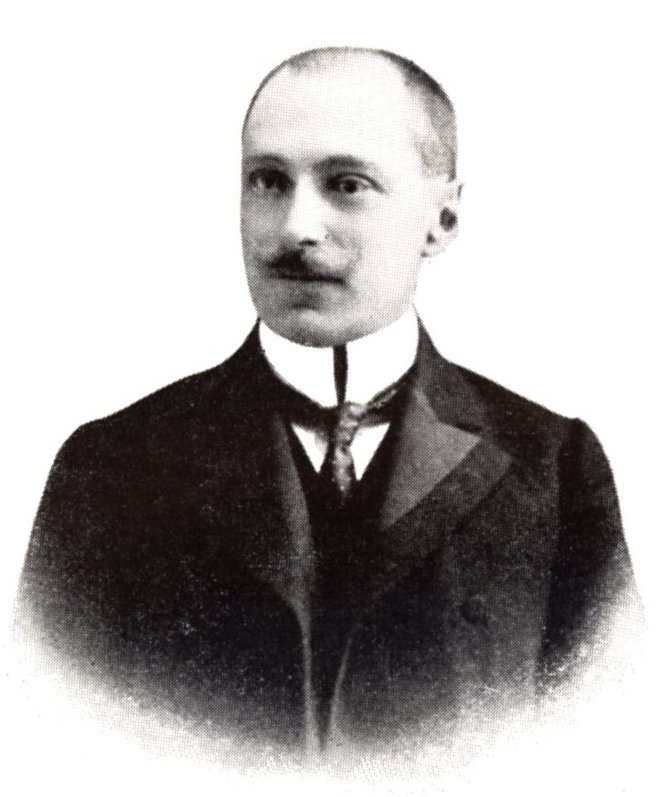 Dömötör Mihály (1875-1962) ügyvéd, poltiikus